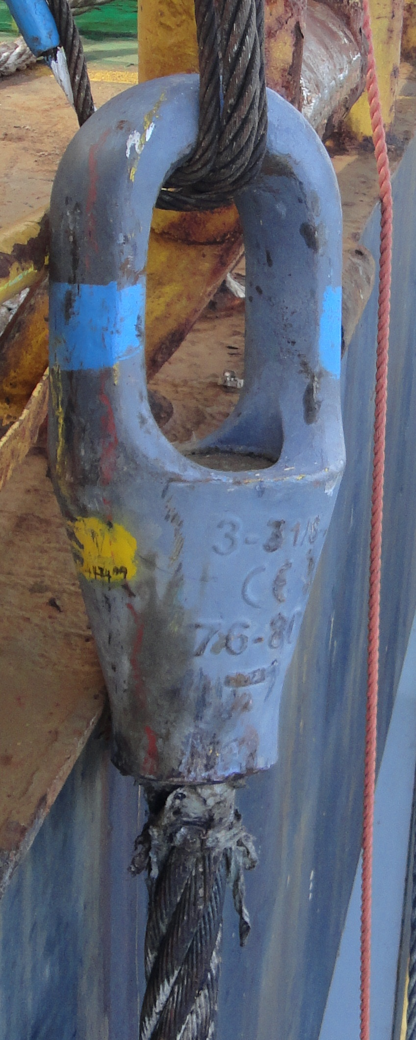 Closed spelter socket, 3"- 3.1/8" / 76-80mm